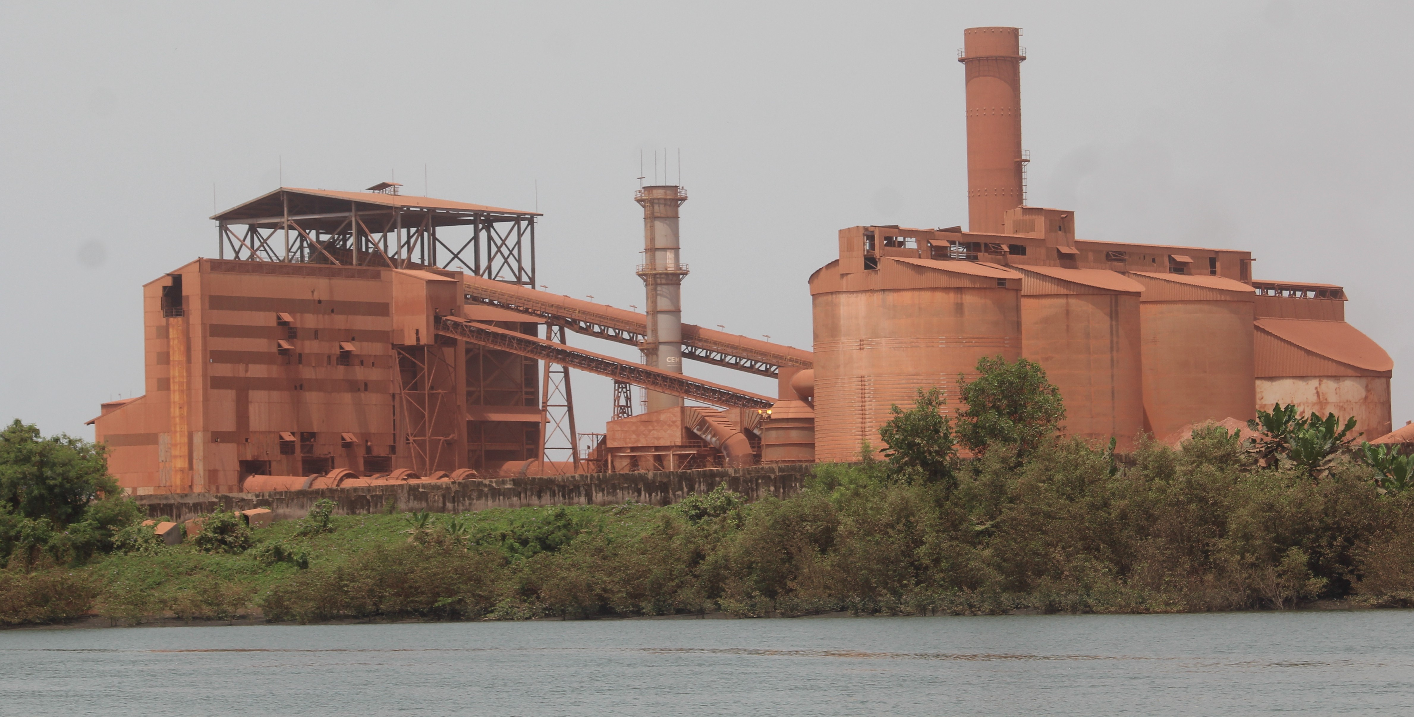 CBG a Kamsar Guinée This is an image with the theme "Africa on the Move or Transport" from: Guinea